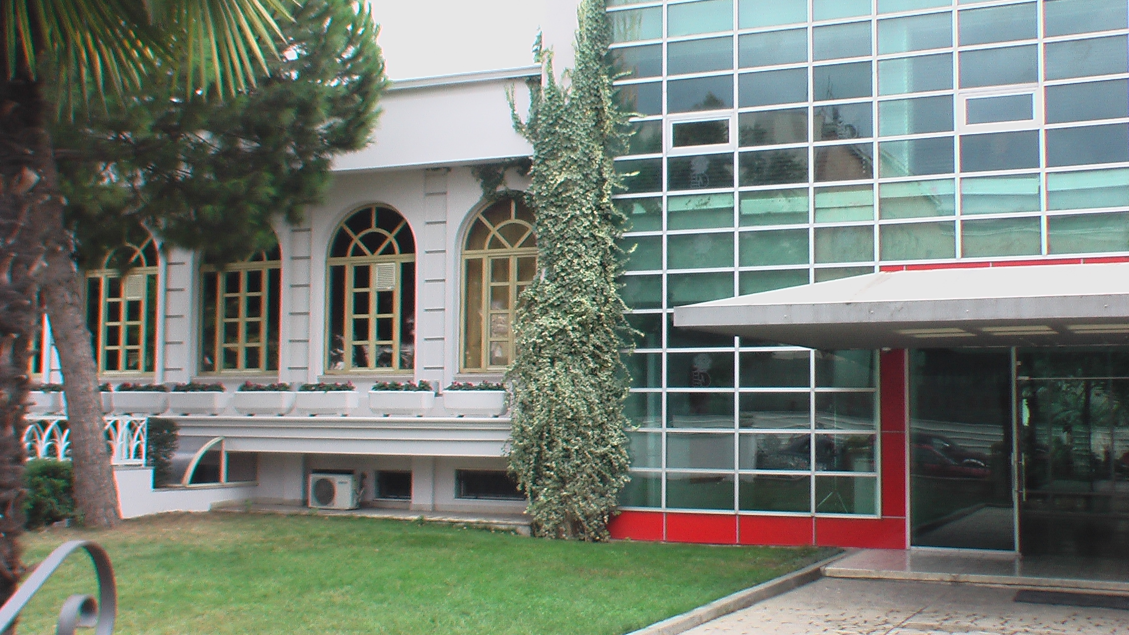 TiranaHausDerSozialistischenPartei